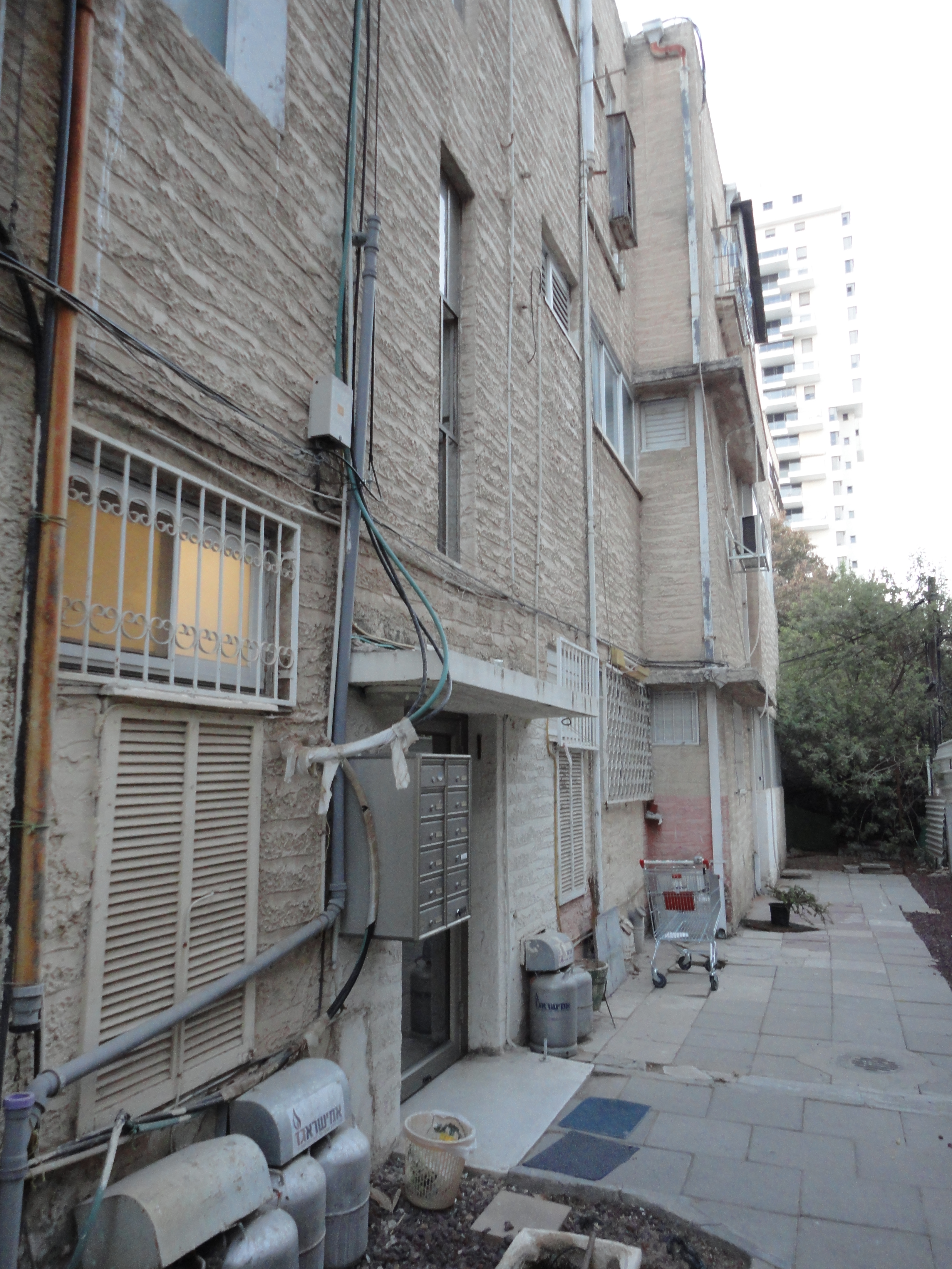 בתי באוהאוס ברחוב הרצל ברמת גן הרצל 20